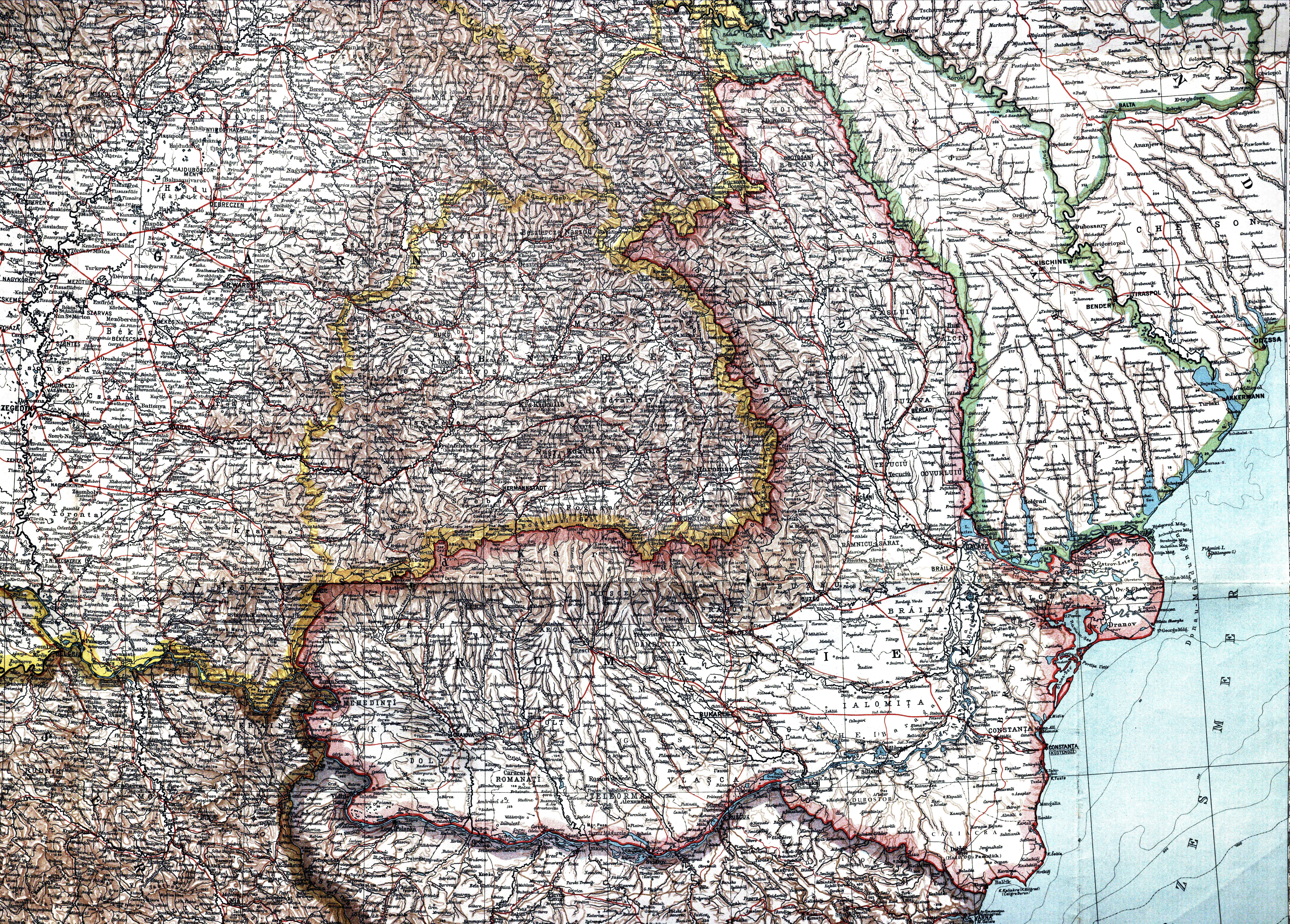 Romania după Al Doilea Război Balcanic (1913)